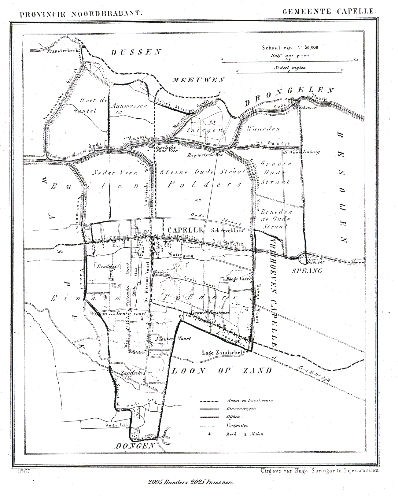 Nederland, Noord-Brabant, Gemeente Capelle